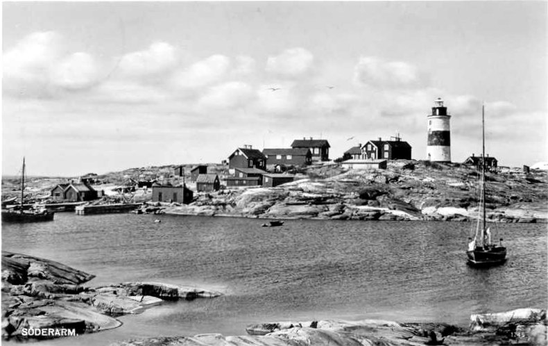 Söderarm